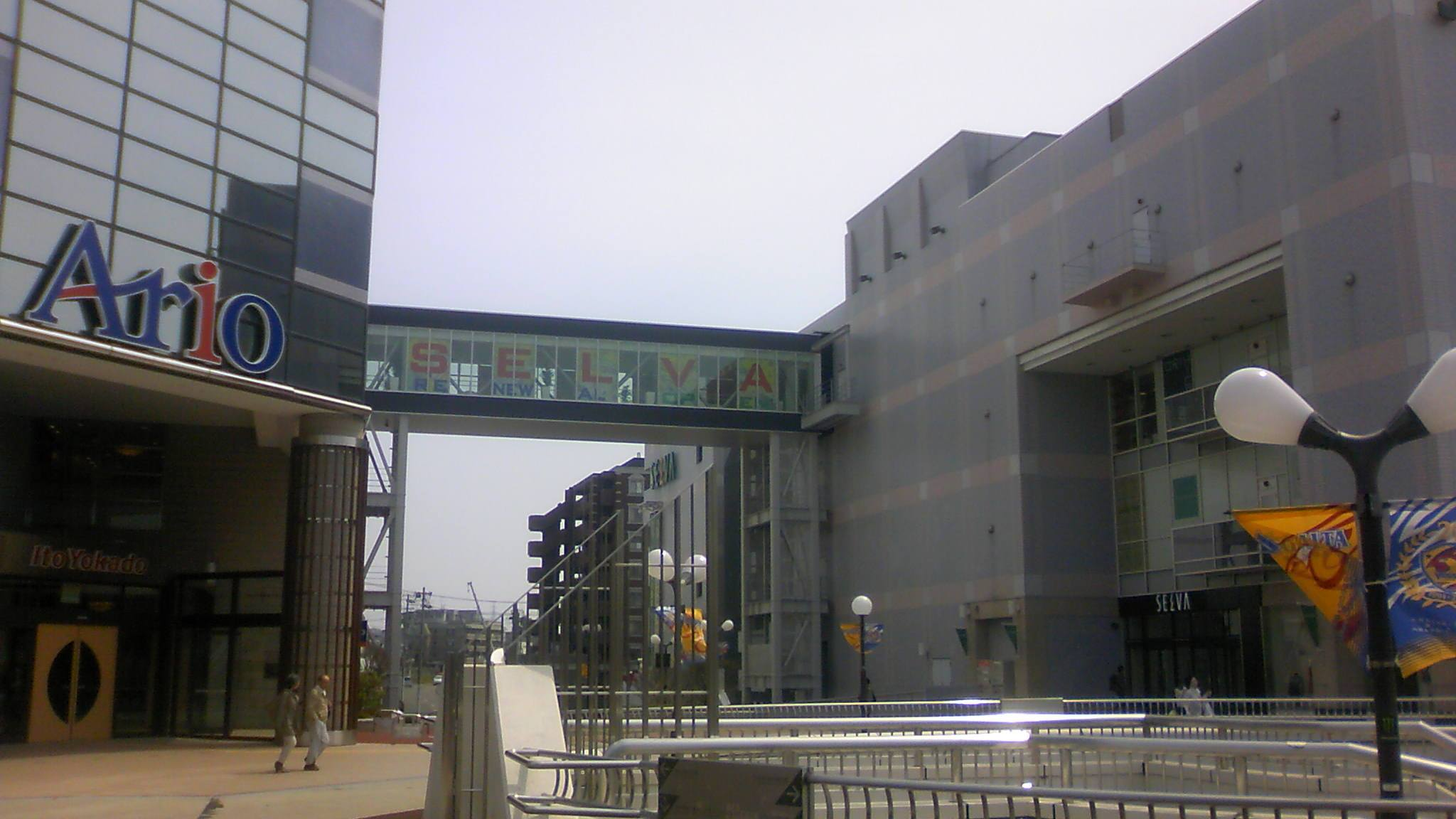 セルバとアリオ仙台泉を結ぶ連絡通路